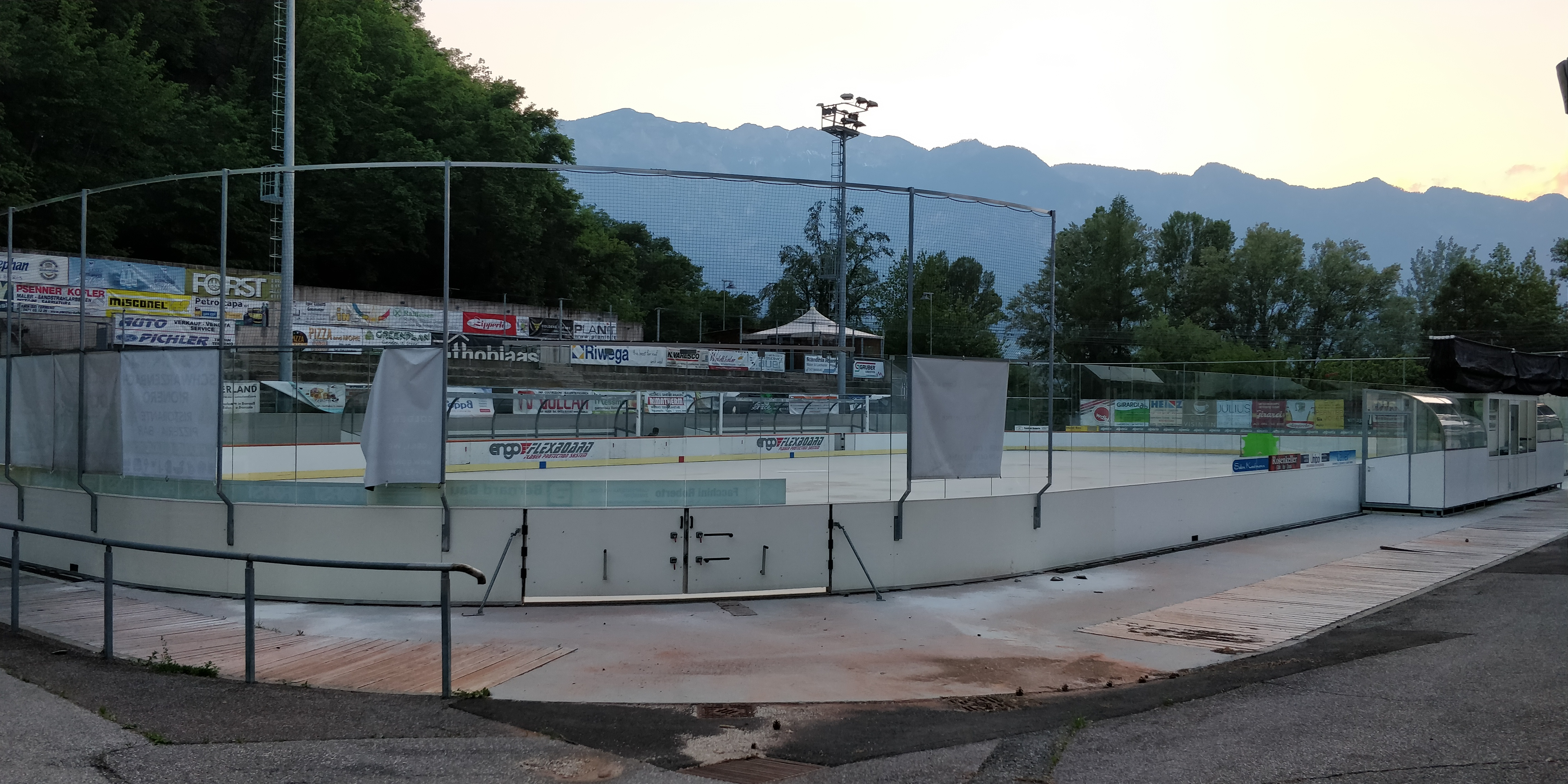 Stadio del Ghiaccio Rio Nero di Ora